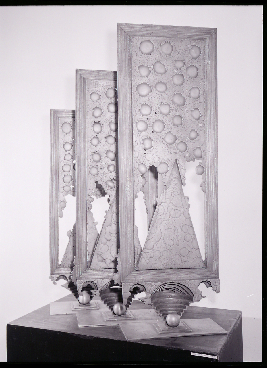 Bologna. Sculture di Quinto Ghermandi esposte alla Galleria San Luca. Servizio fotografico : Bologna, 1970 / Paolo Monti. - Buste: 12, Fototipi: 12 : Negativo b/n, gelatina bromuro d'argento/ pellicola ; 10x12. - ((Serie costituita da 12 negativi identificati con i nn.: 16111-16119. La suddetta serie è contenuta nella scatola identificata con la numerazione G16001-16500. - Occasione: Documentazione per la pubblicazione: "Milano", TOURING CLUB ITALIANO, Milano, 1972. - Fonte: Agenda di Paolo Monti: Monti/ 3 aprile 1966 - 9 marzo 1971/ 12421-16823 (1966-1971), presso Archivio Paolo Monti